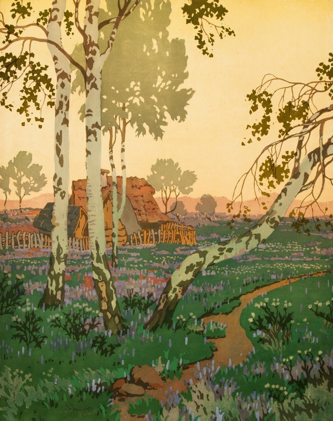 Birken, mit Bleistift links unten signiert: B. Jaroněk, farbiger Holzschnitt auf Papier, 62 x 50 cm